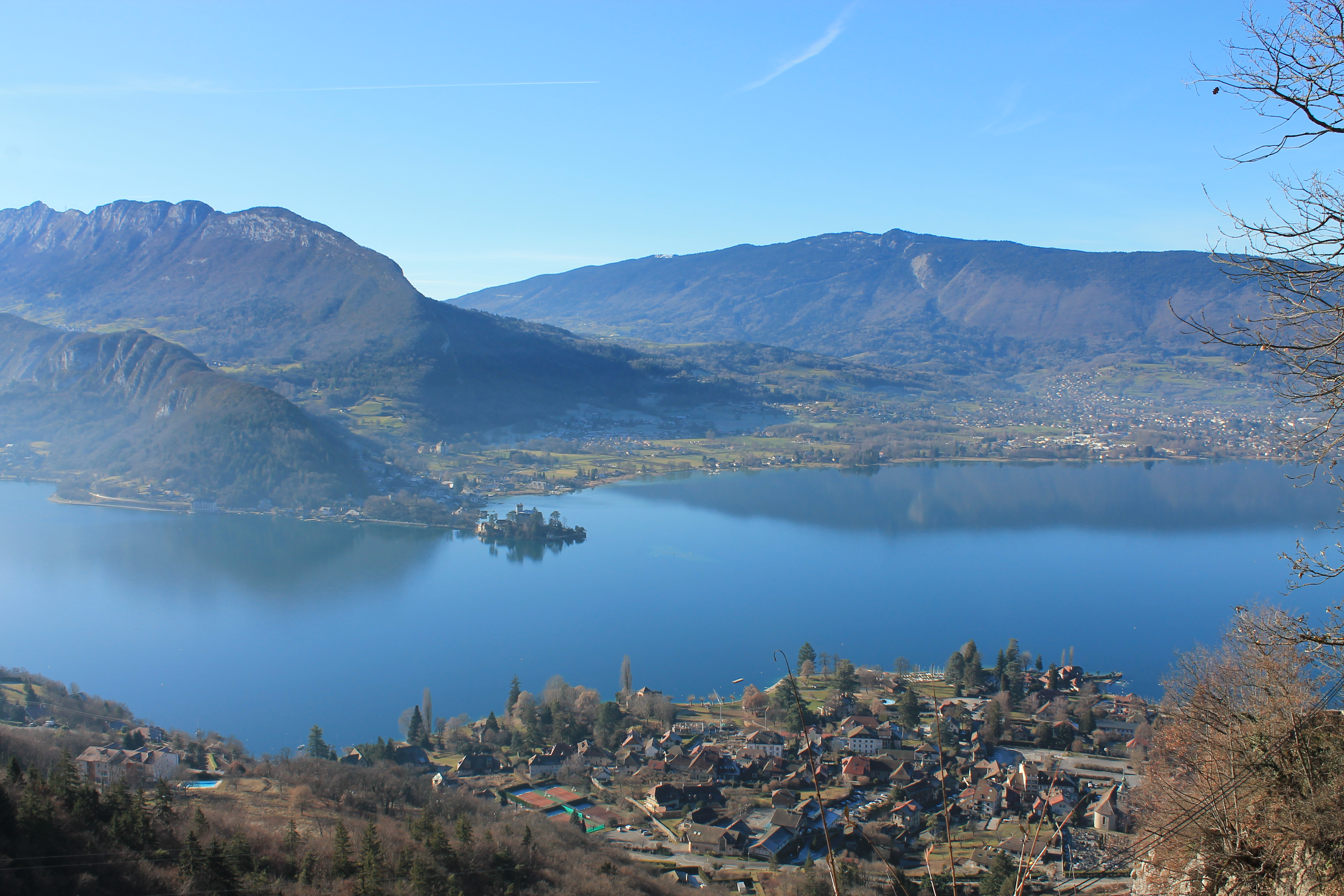 Vue du Talloires depuis l'Ermitage. Au fond, les villages de Duingt et ses châteaux et le pays du Laudon